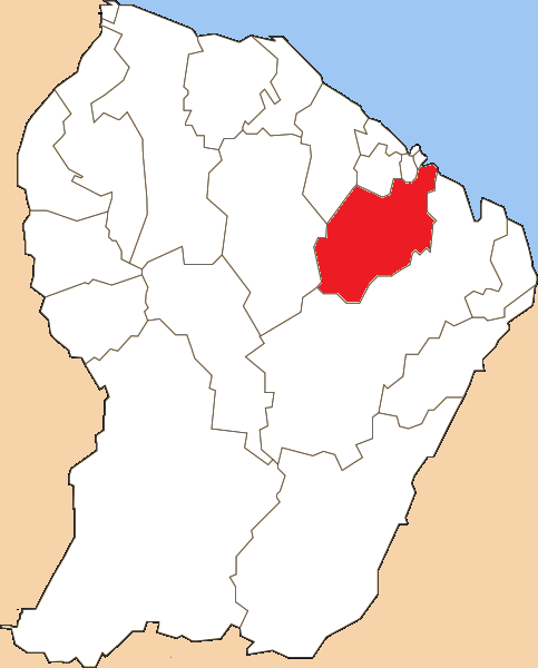 Situation du canton dans le département de la Guyane